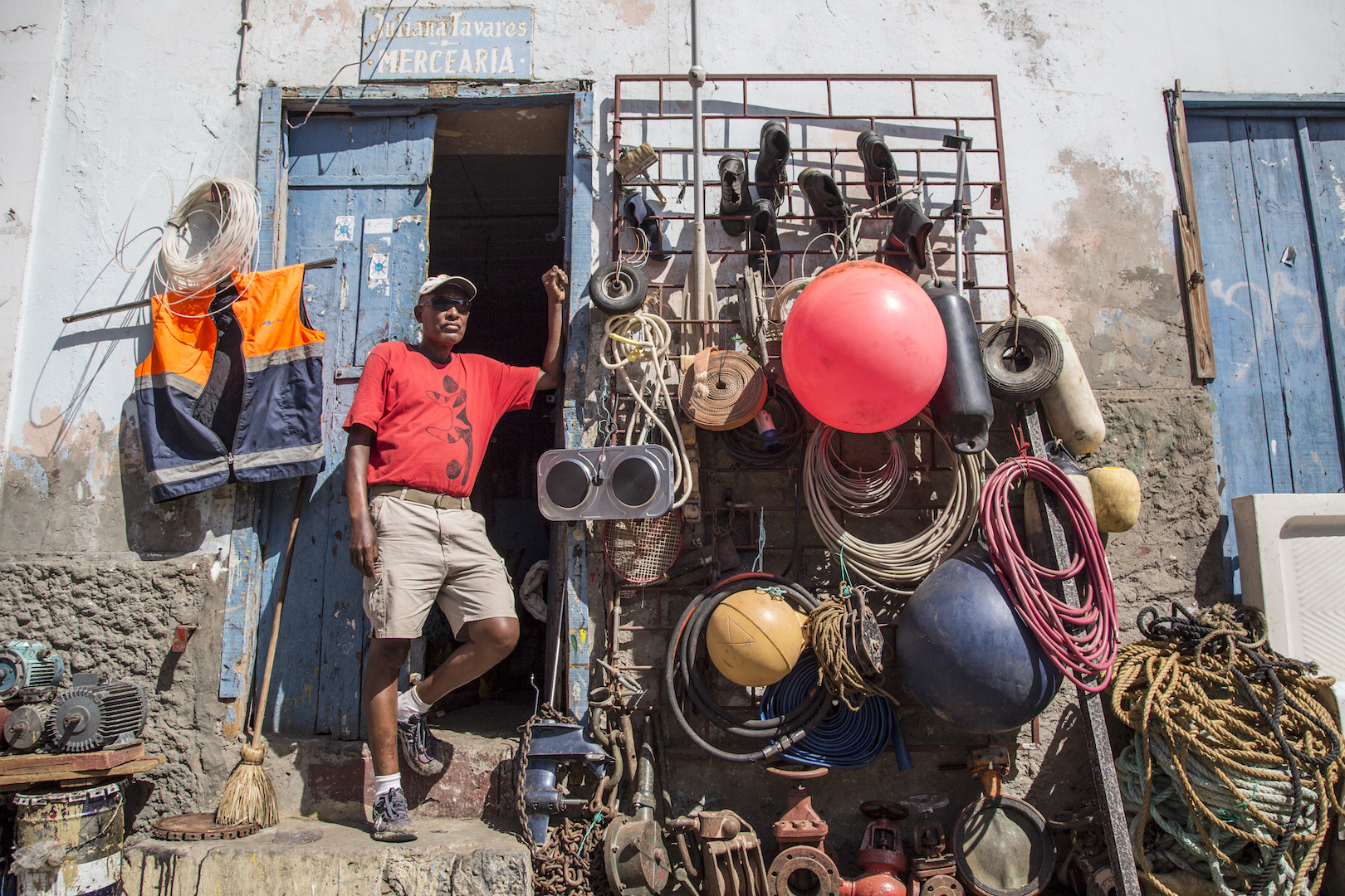 Vendeur de matériel nautique d'occasion, Mindelo, Sao Vicente, Cap Vert This is an image of "African people at work" from Cape Verde